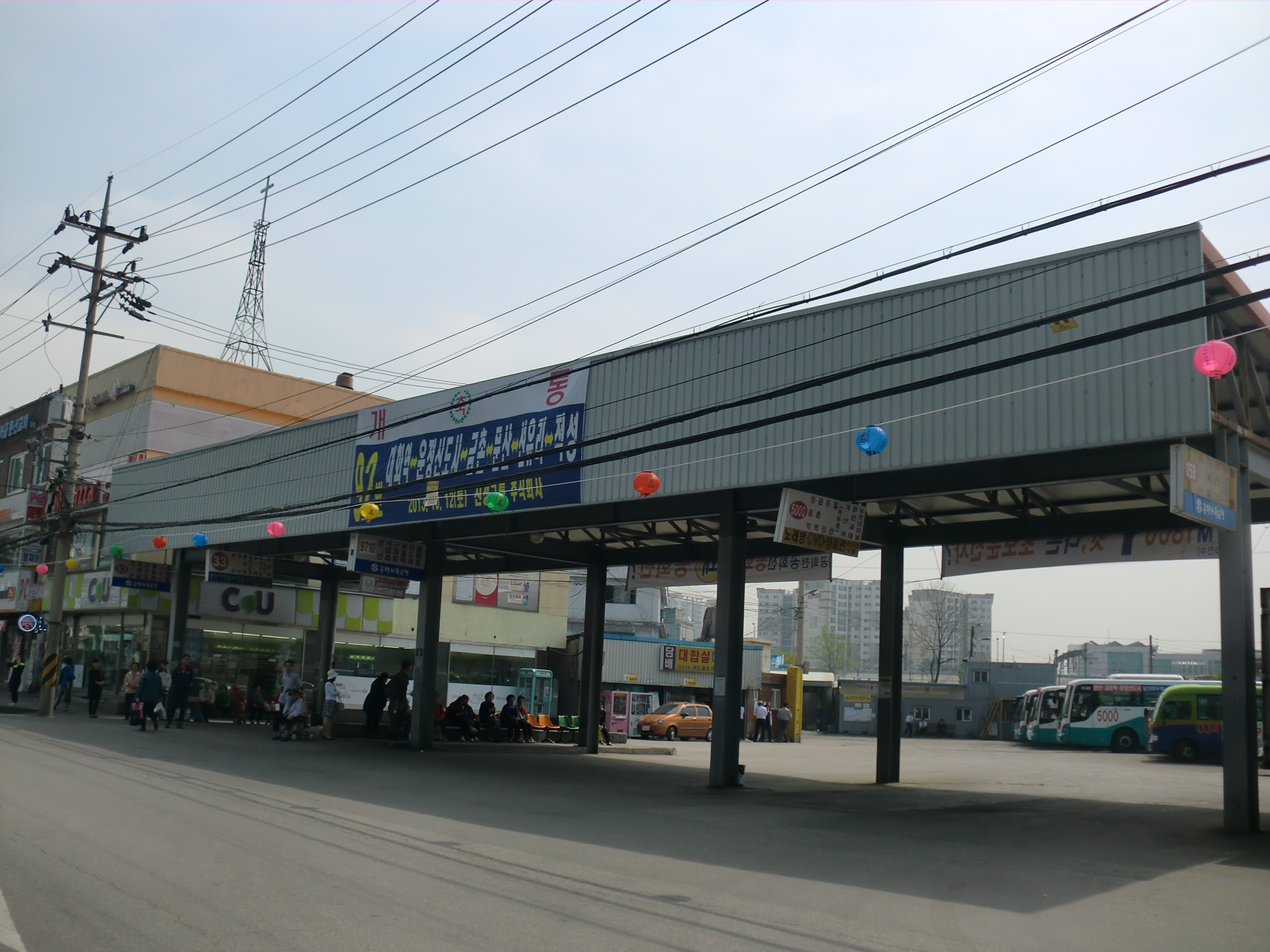 경기도 파주시에 있는 문산버스터미널